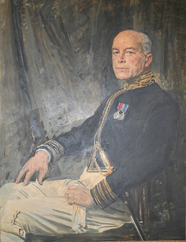 Cuadro de propiedad de la Familia - Circa 1933 - Vistiendo traje de gala y medallas de la coronación del Rey y jubileo del Rey